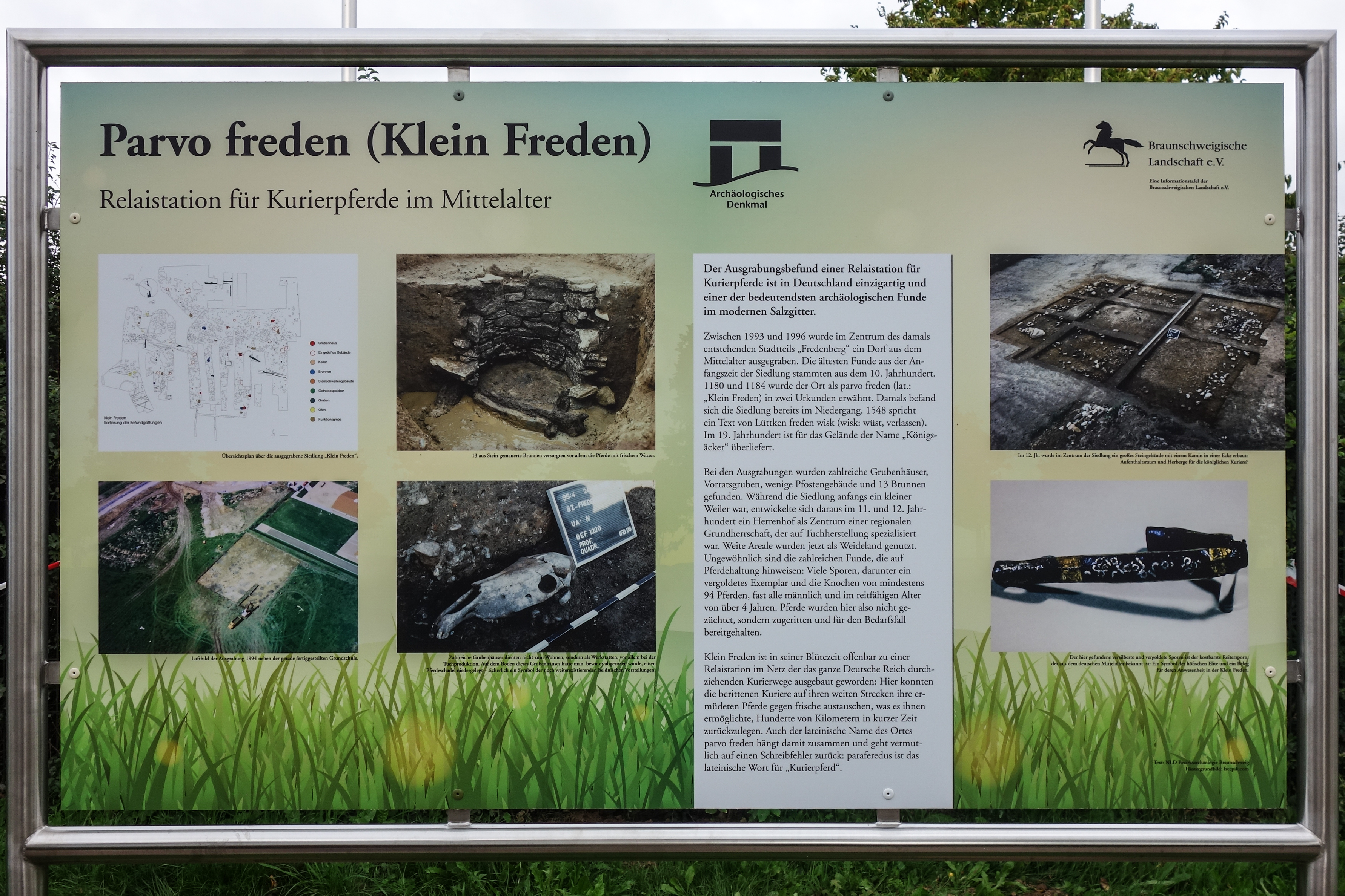 Informationstafel zur Wüstung Klein Freden (2017 aktualisiert) am Rande des ehemaligen Ausgrabungsgeländes (östlich der Grundschule am Dürerring).